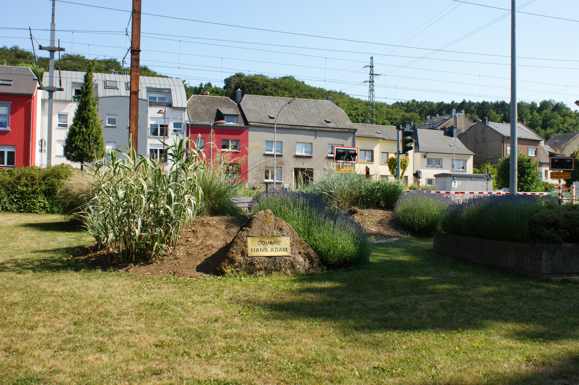 De Square Hans Adam zu Schëffleng.